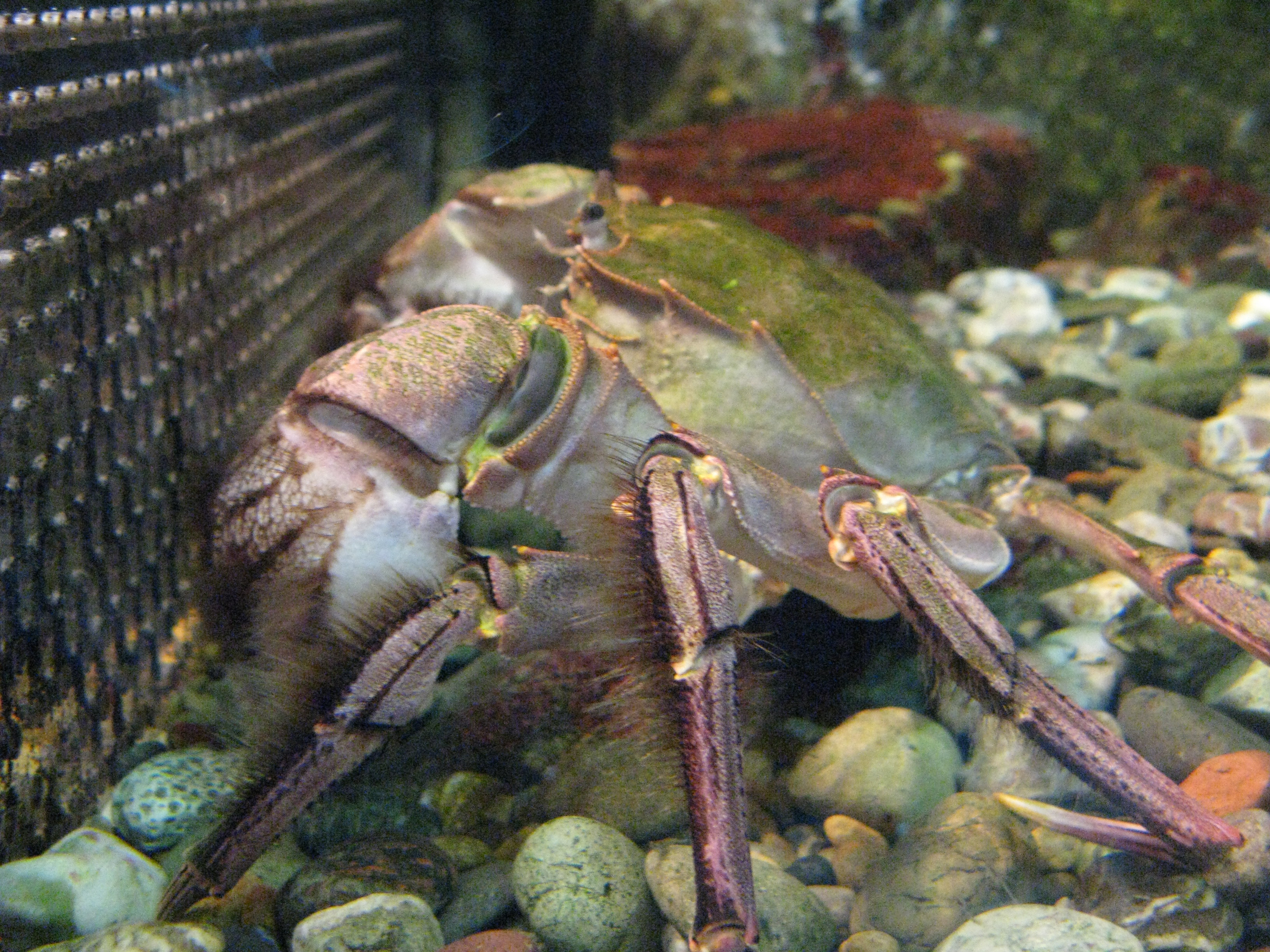 Scientific name Eriocheir japonica